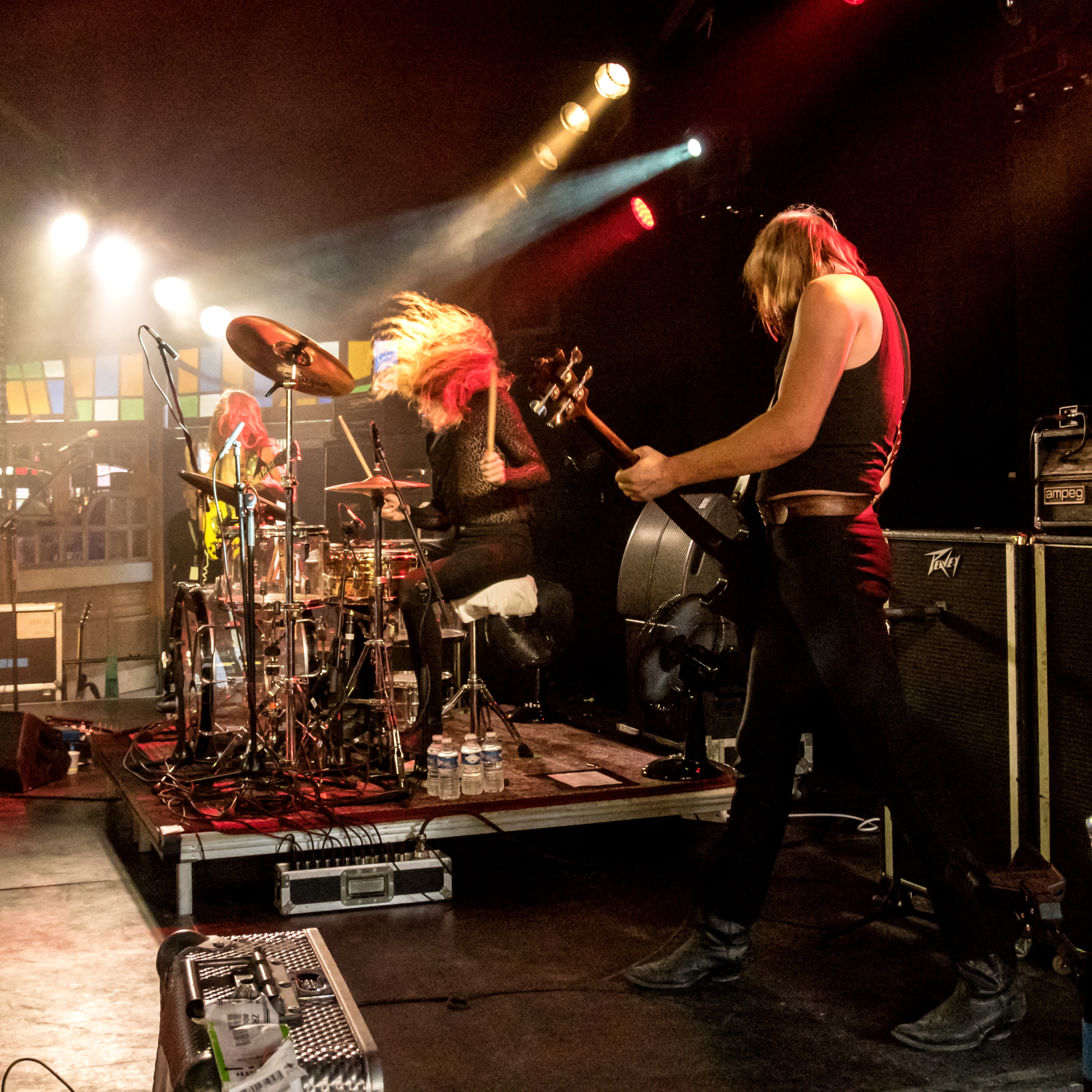 Bilder vom Zelt Musik Festival 2017 in Freiburg im Breisgau